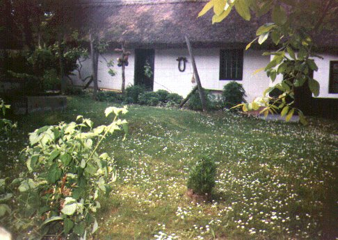 Tényői szabadtéri skanzen